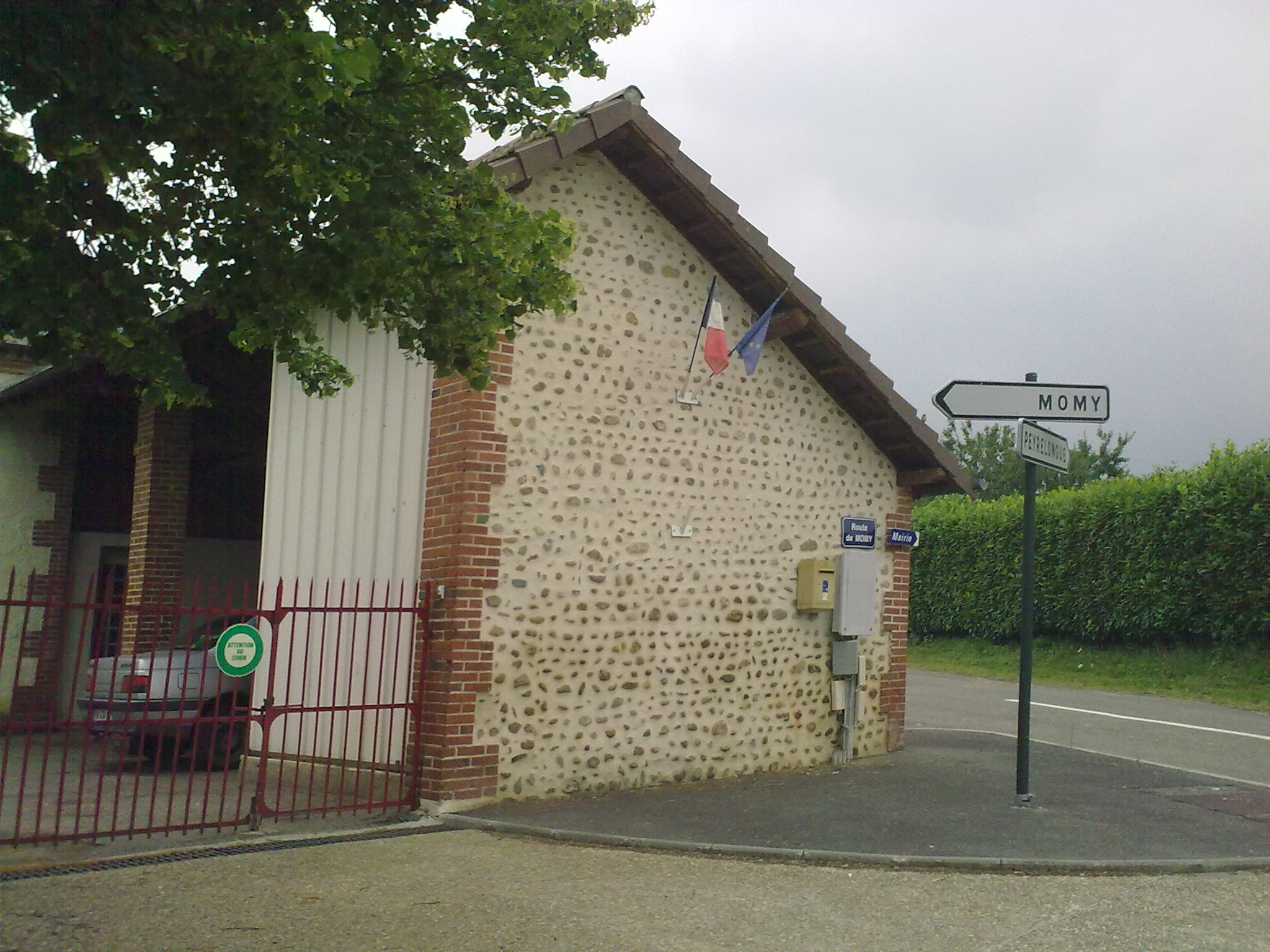 Mairie de Lucarré